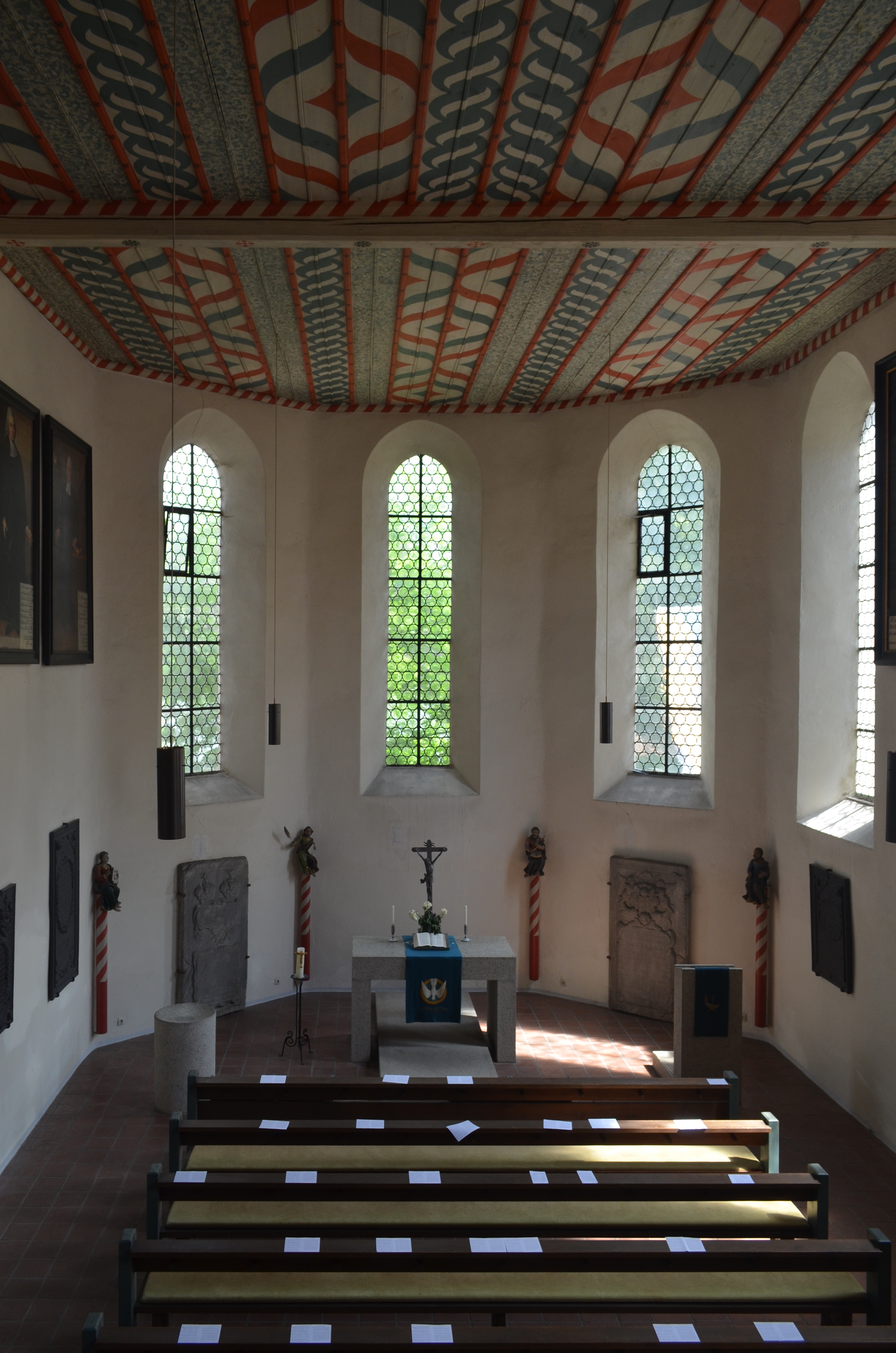 Wunsiedel (Bavière-Allemagne) - Spitalkirche.